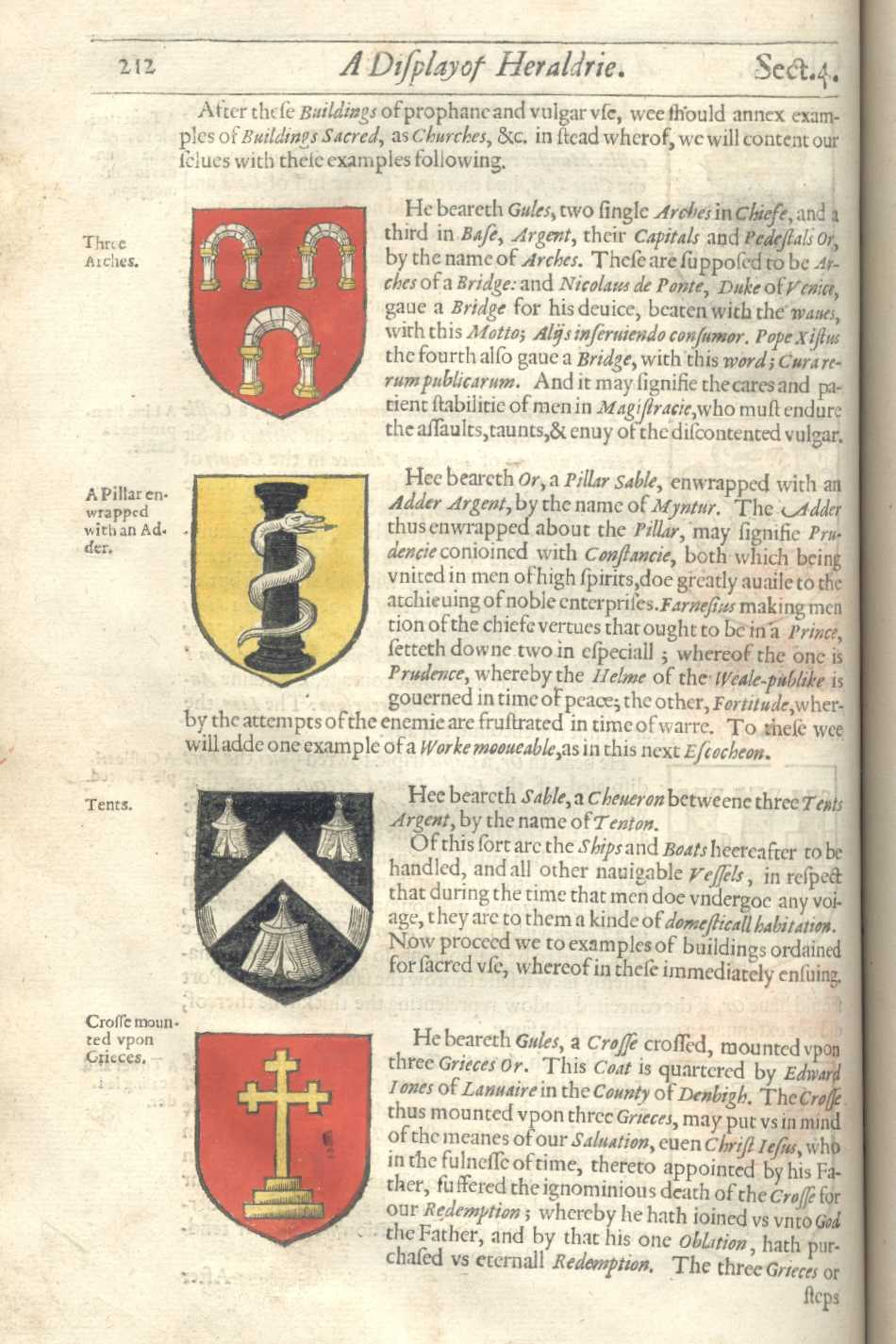 Egy lap John Guillim A Display of Heraldrie című könyvéből